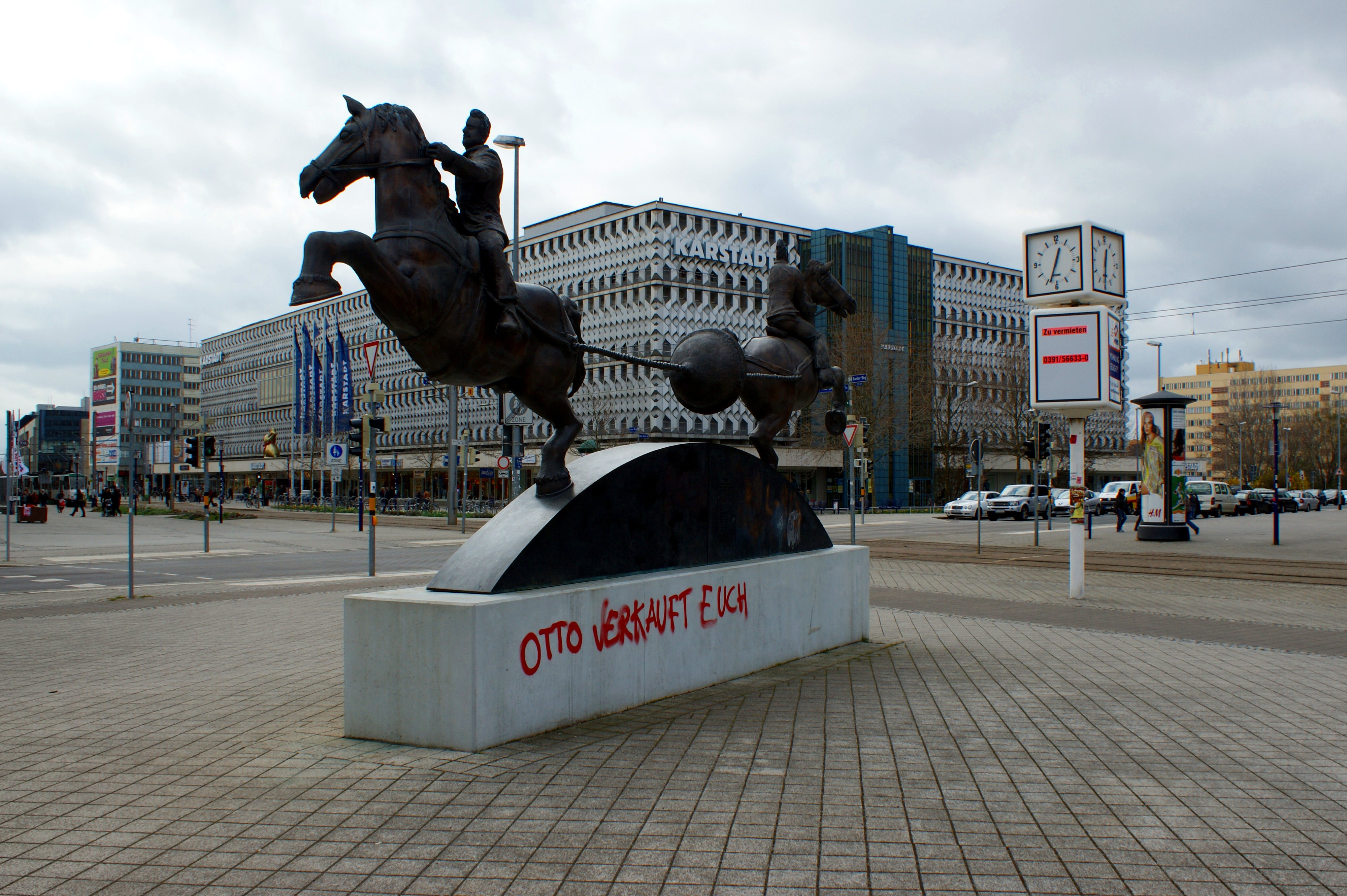 Das Denkmal zu Otto von Guerickes Halbkugelversuch auf dem Ratswaageplatz in Magdeburg, Künstler: Thomas Virnich. Rückseite siehe: File:Magdeburger Halbkugeln am Ratswaageplatz, Rückansicht.jpg